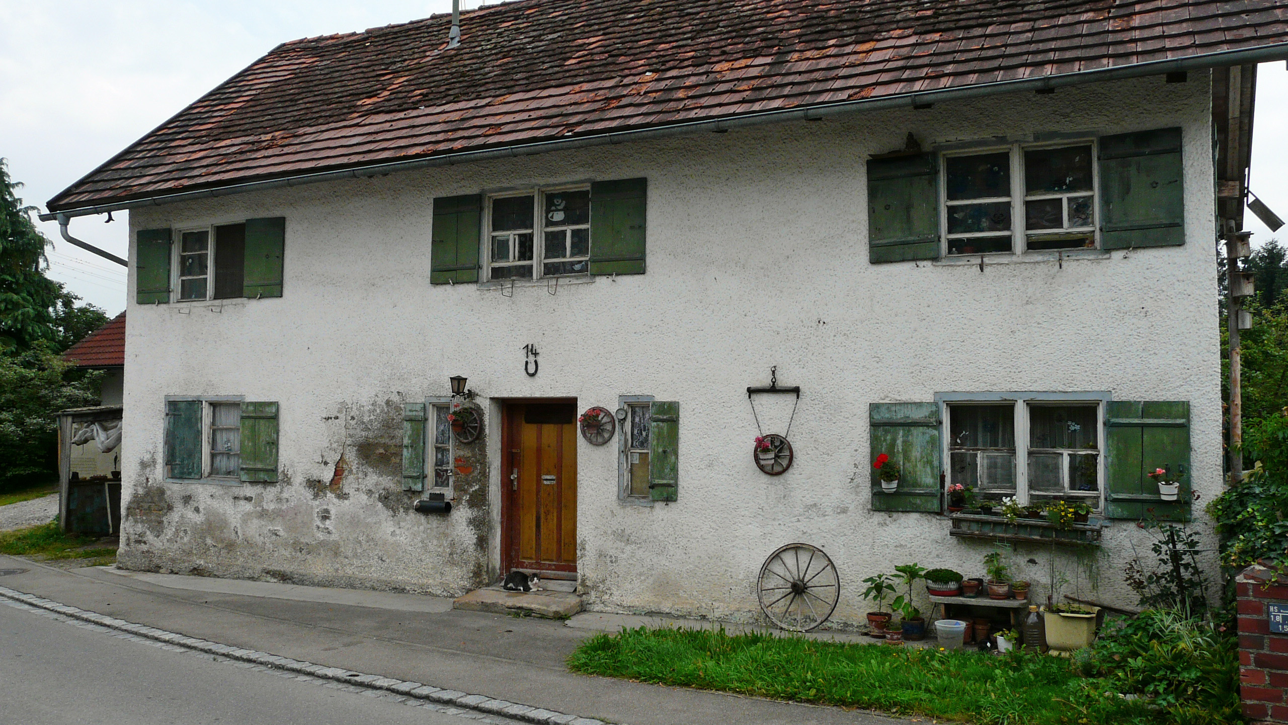 Bergstr. 14 in Frickenhausen, Lauben (Unterallgäu)